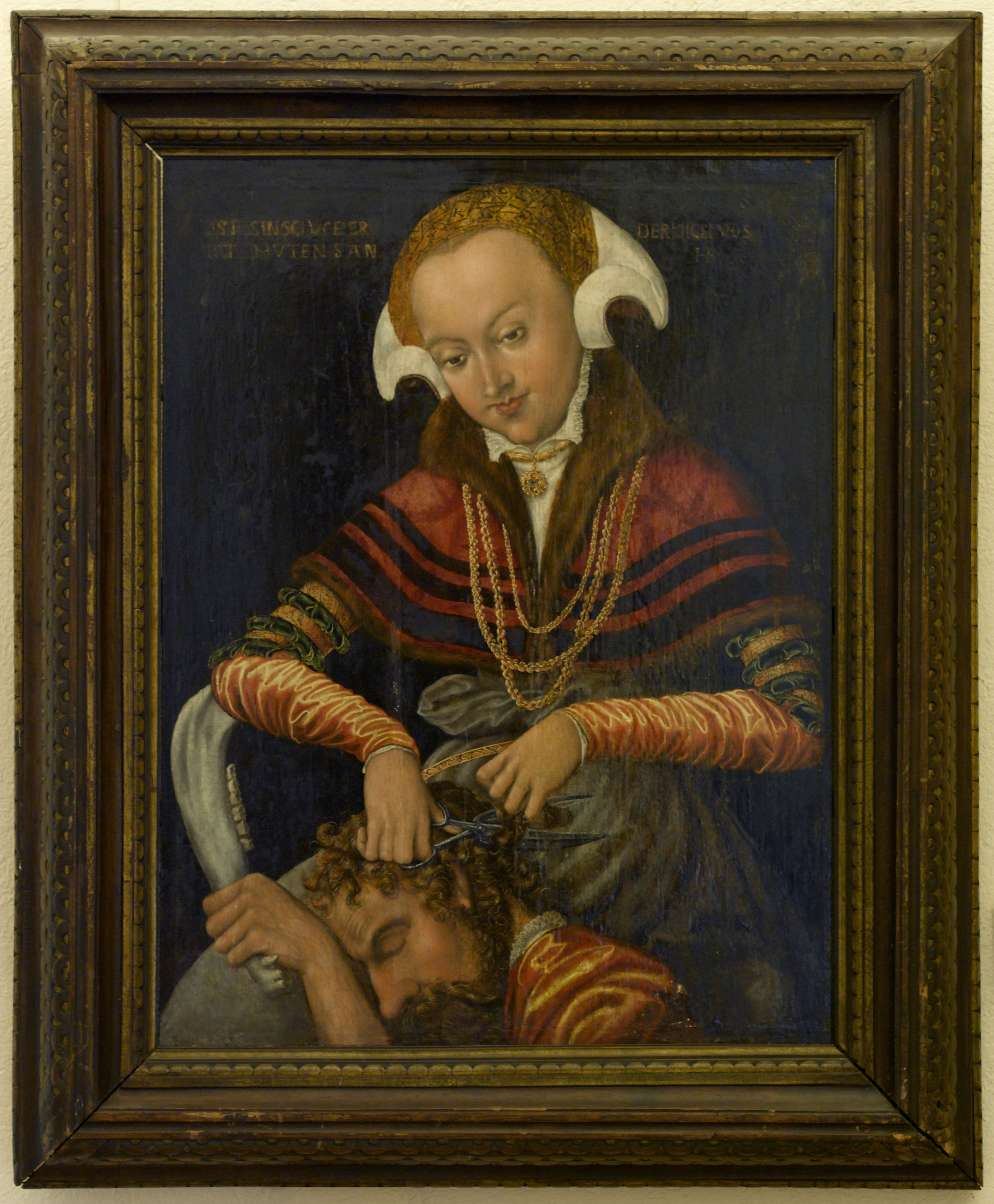 Dalila coupant les cheveux de Samson MNR362-Moulins